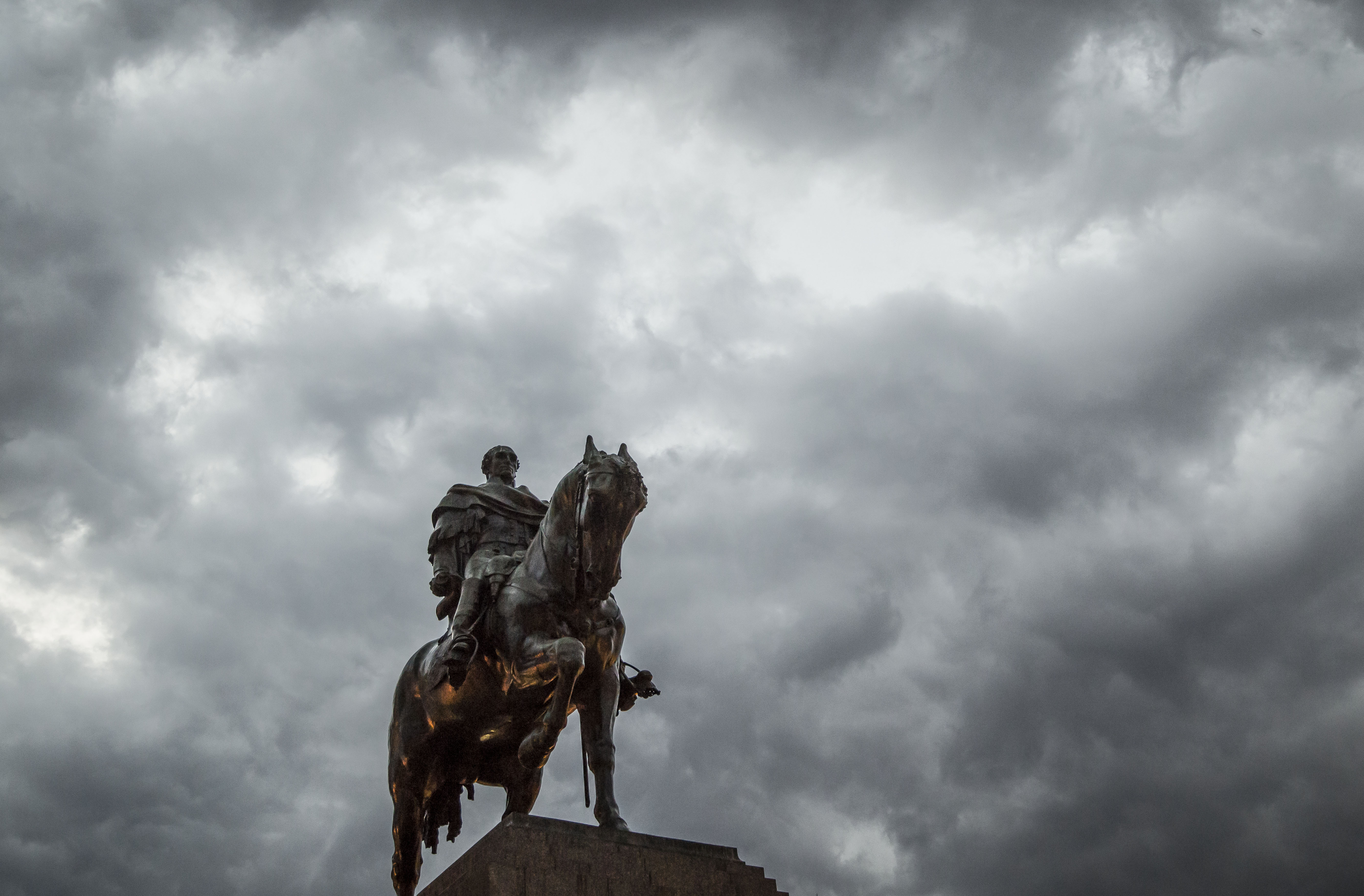 General José Artigas (estatua ecuestre de Plaza Independencia). Ubicada en el departamento de Montevideo